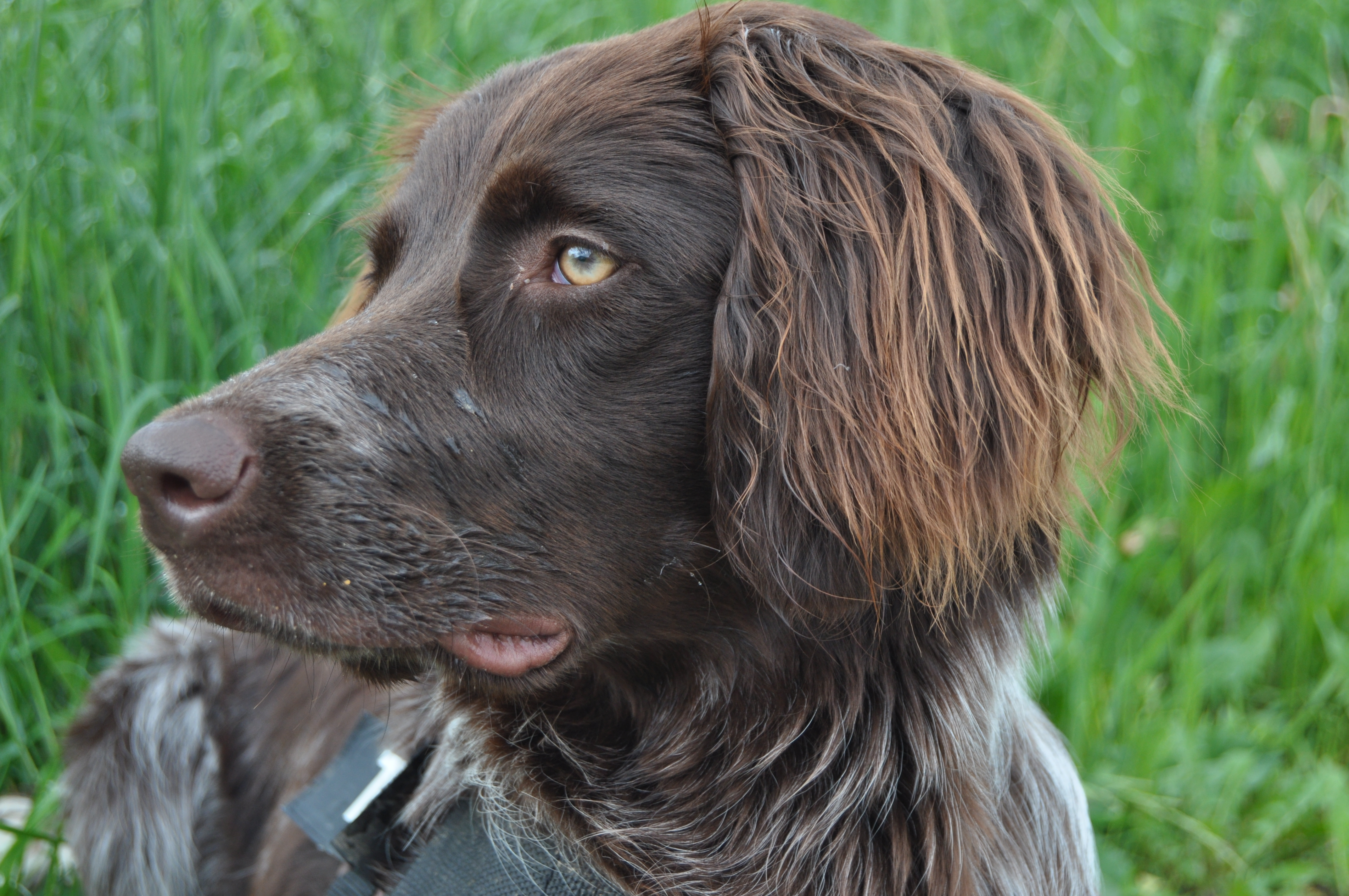 Deutsch-Langhaar, 11 Monate alt